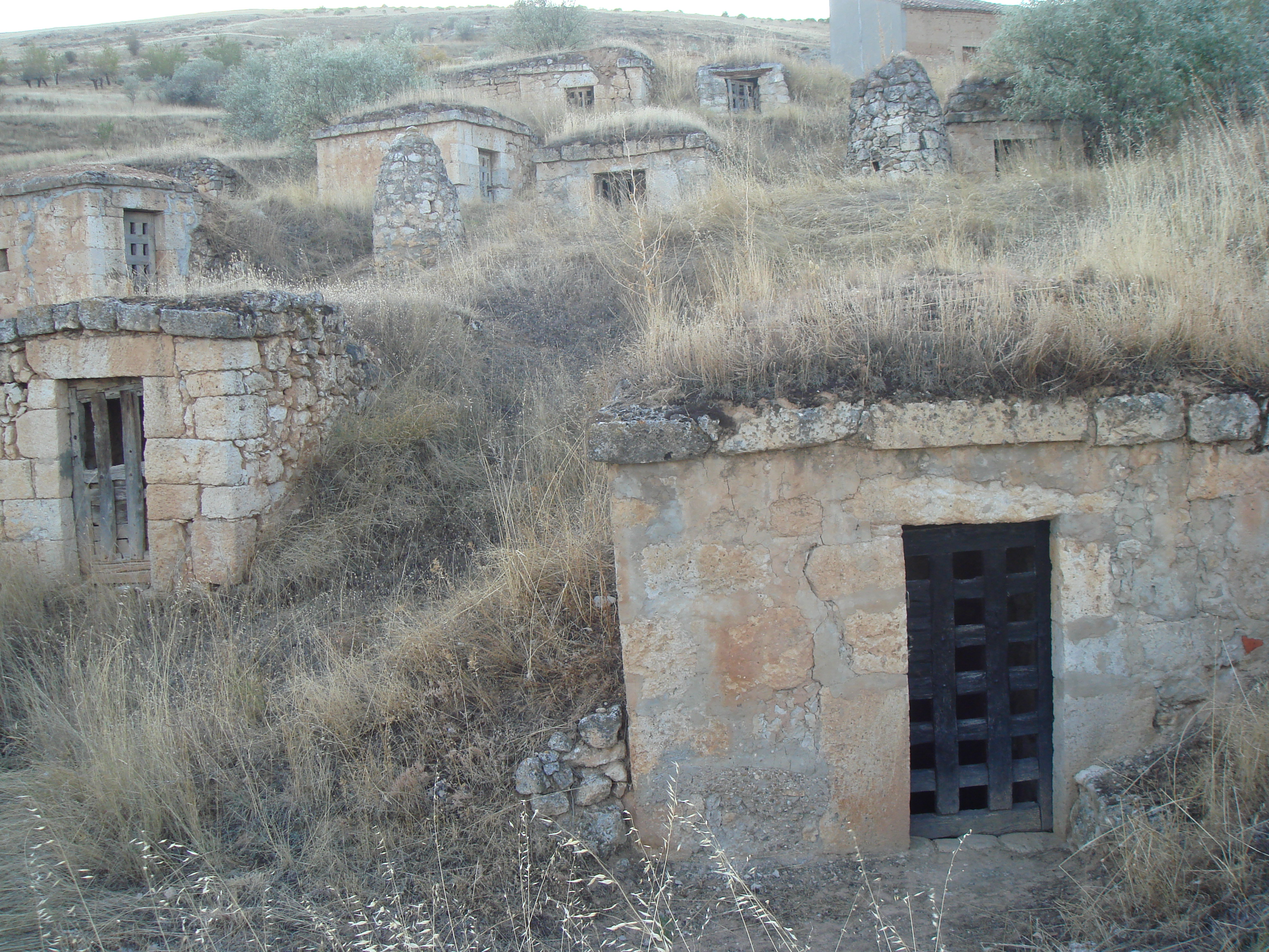 Ubicación bodegas San Martín de Rubiales (Burgos, España)